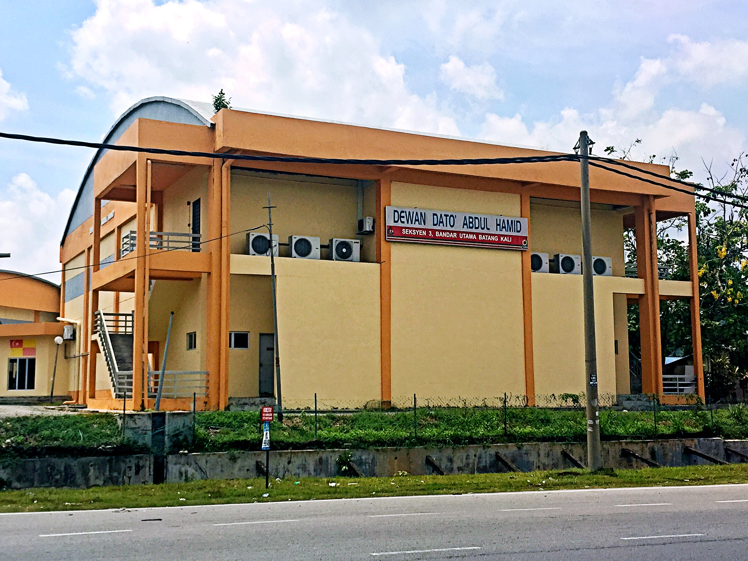 图为峇冬加里的拿督阿都哈密民用礼堂。